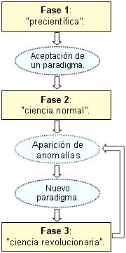 Las fases de la Ciencia según Thomas Kuhn por maria antoñeta